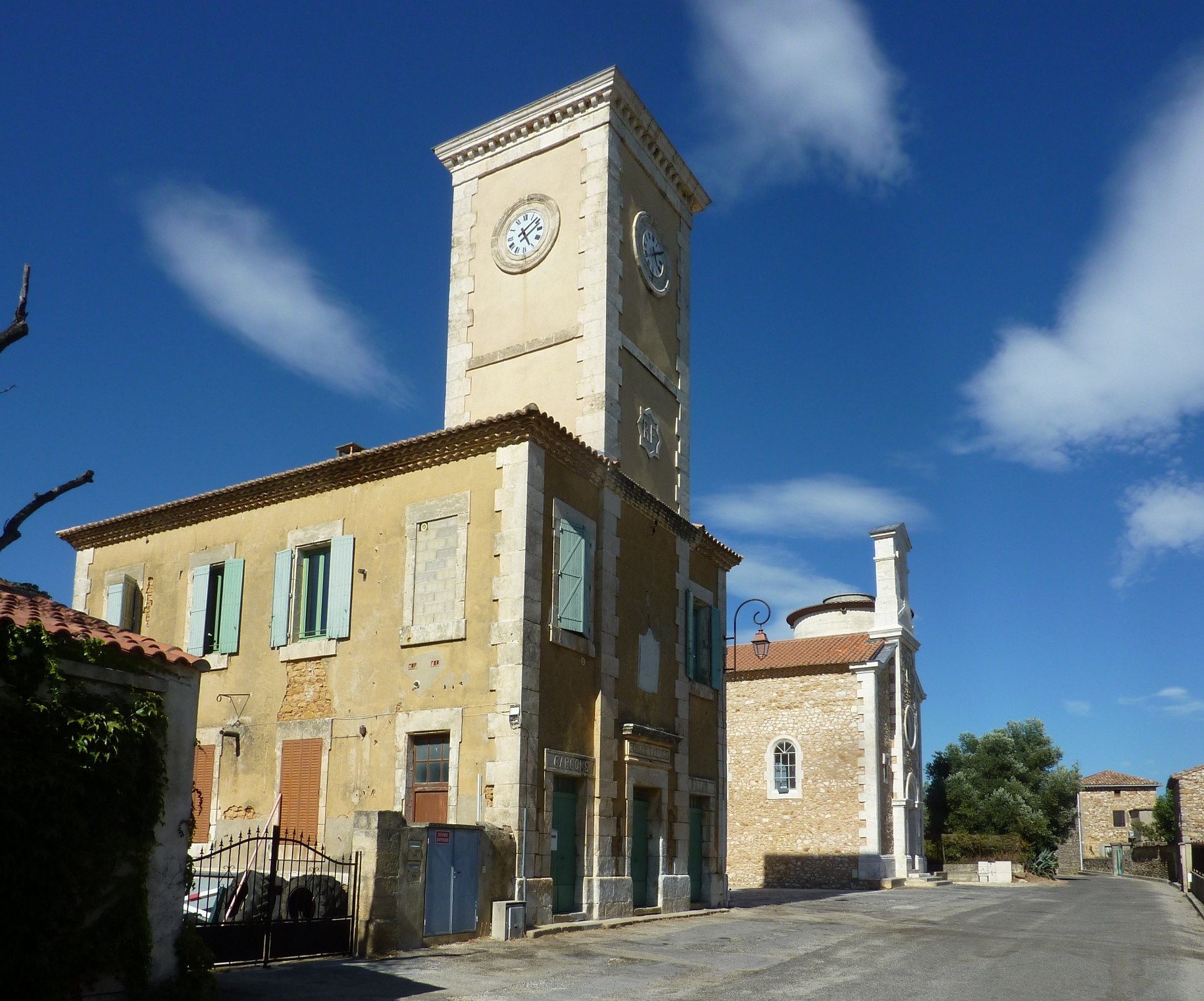 Baron, Gard